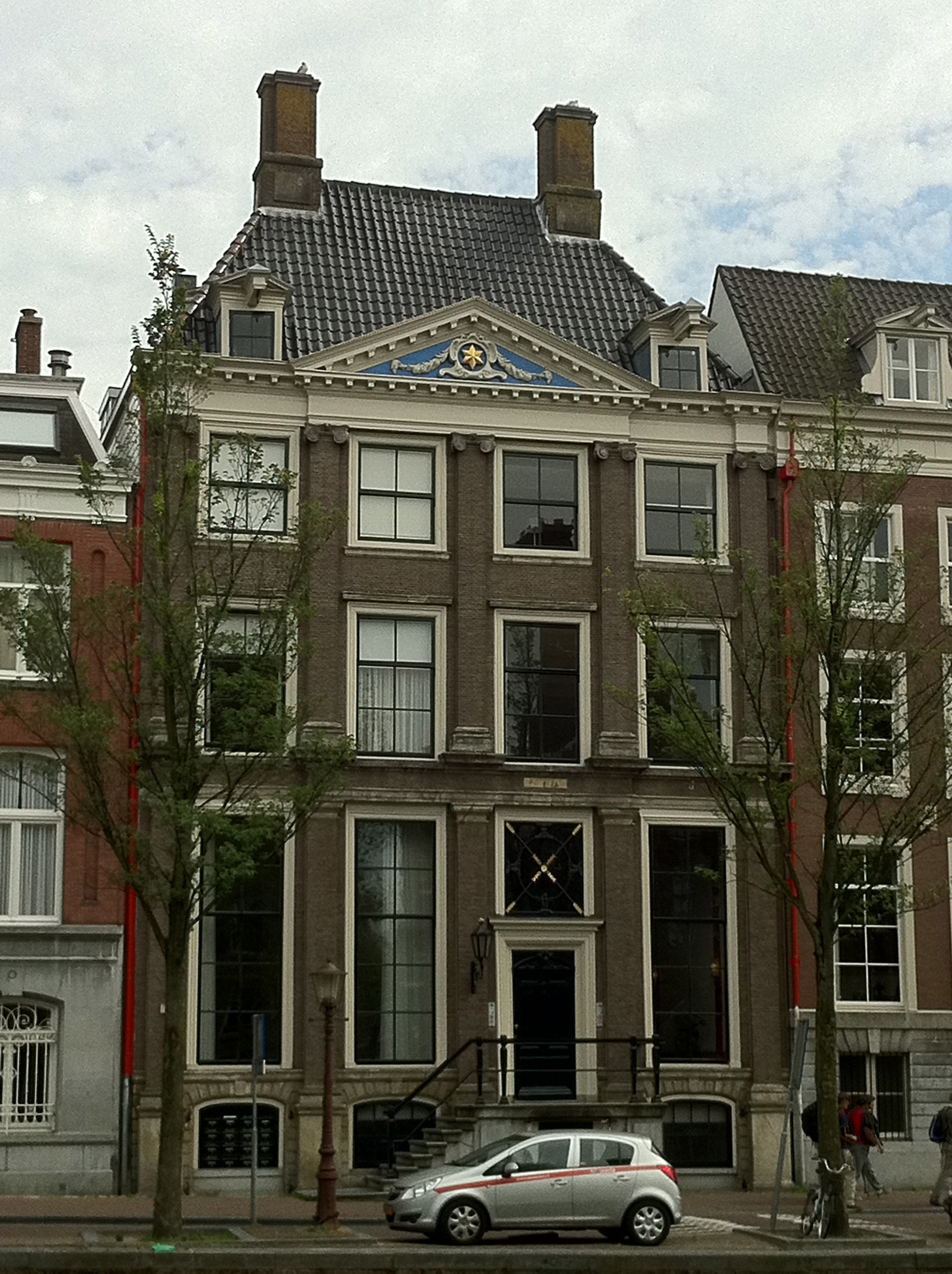 Kloveniersburgwal 77, Amsterdam. Huis, door philips vingboons, met vierraams pilastergevel met fronton en twee dakkapellen in het schilddak 4″ N, 4° 53′ 51″ E Object location52° 22′ 10.49″ N, 4° 53′ 52.28″ E